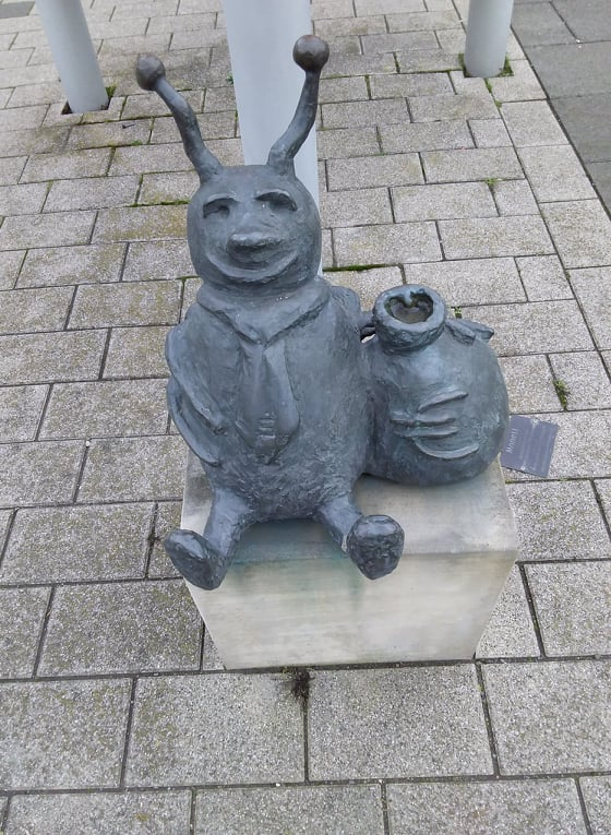 Montei